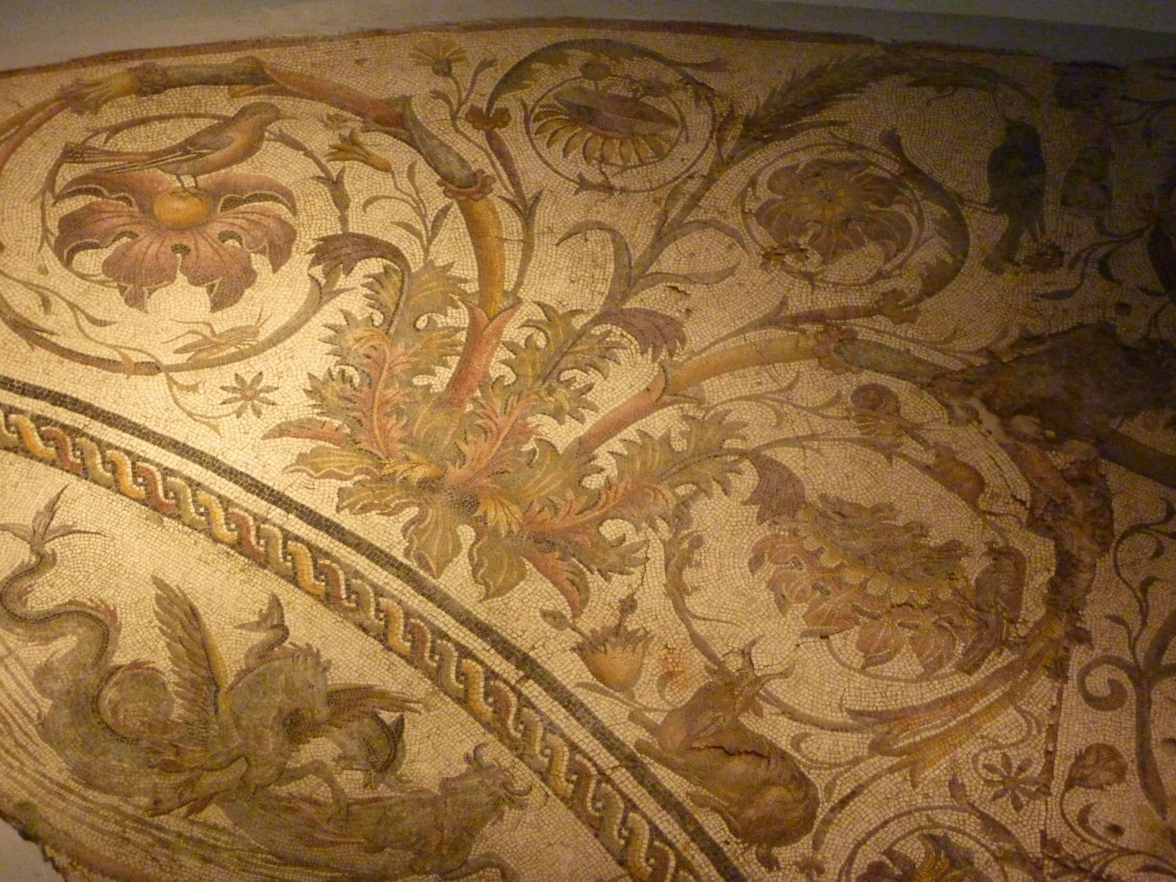 Tripoli-Nationalmuseum,Wandmosaik